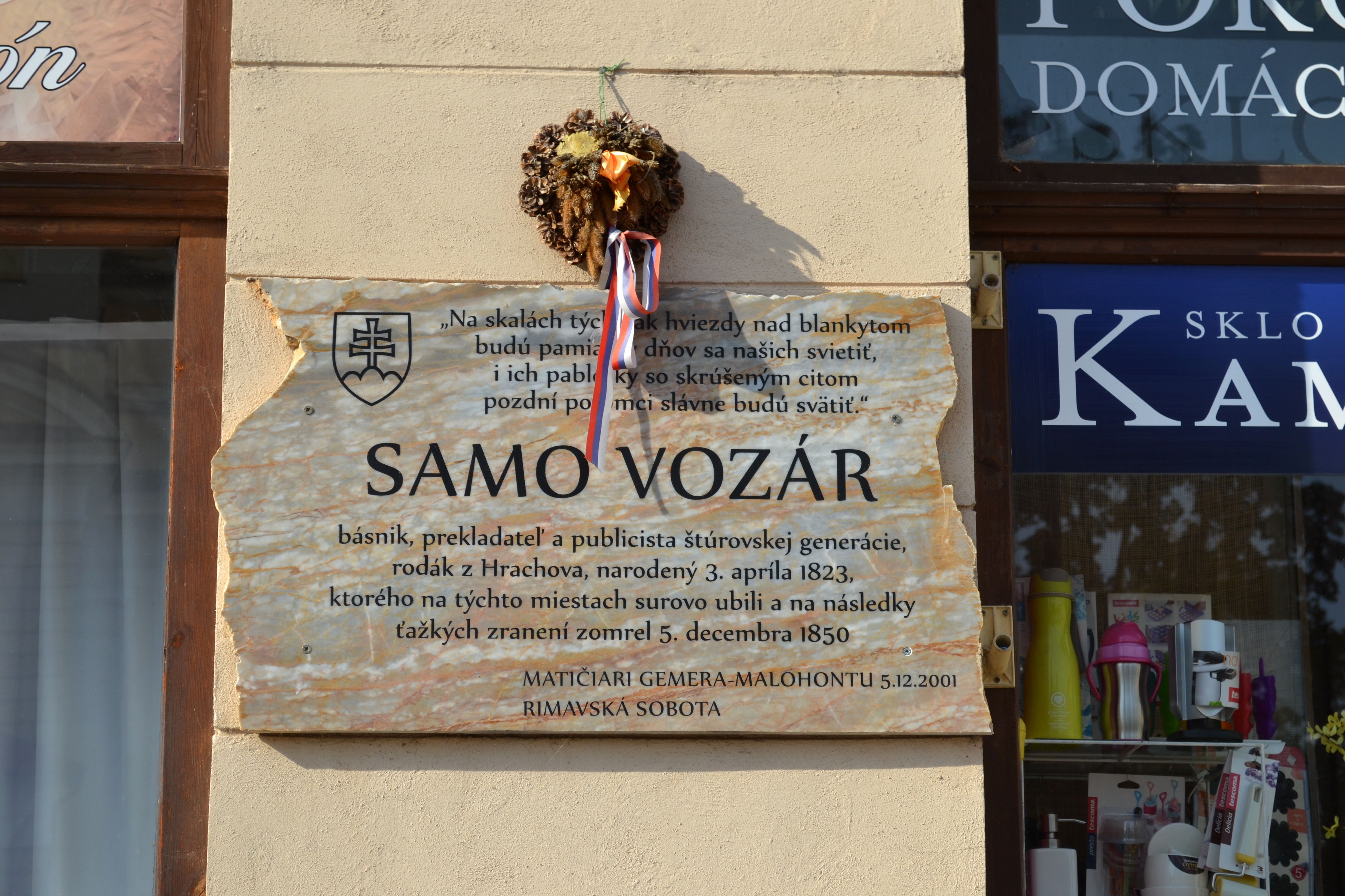 Pamätná tabuľa slovenského básnika Sama Vozára, Hlavné námestie 18 v Rimavskej Sobote